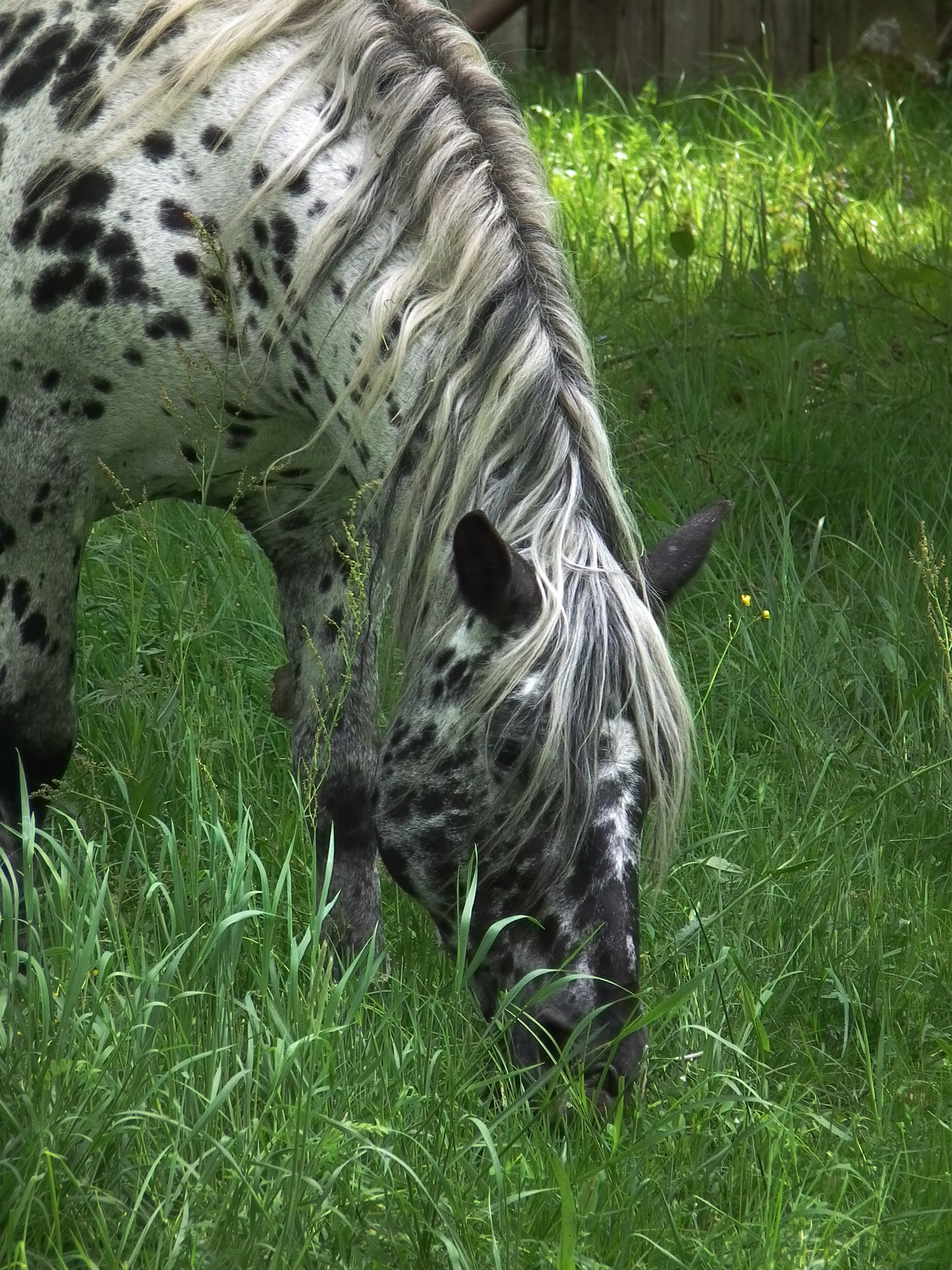 Grasende Noriker-Stute in Bretten (Baden-Württemberg, Deutschland)